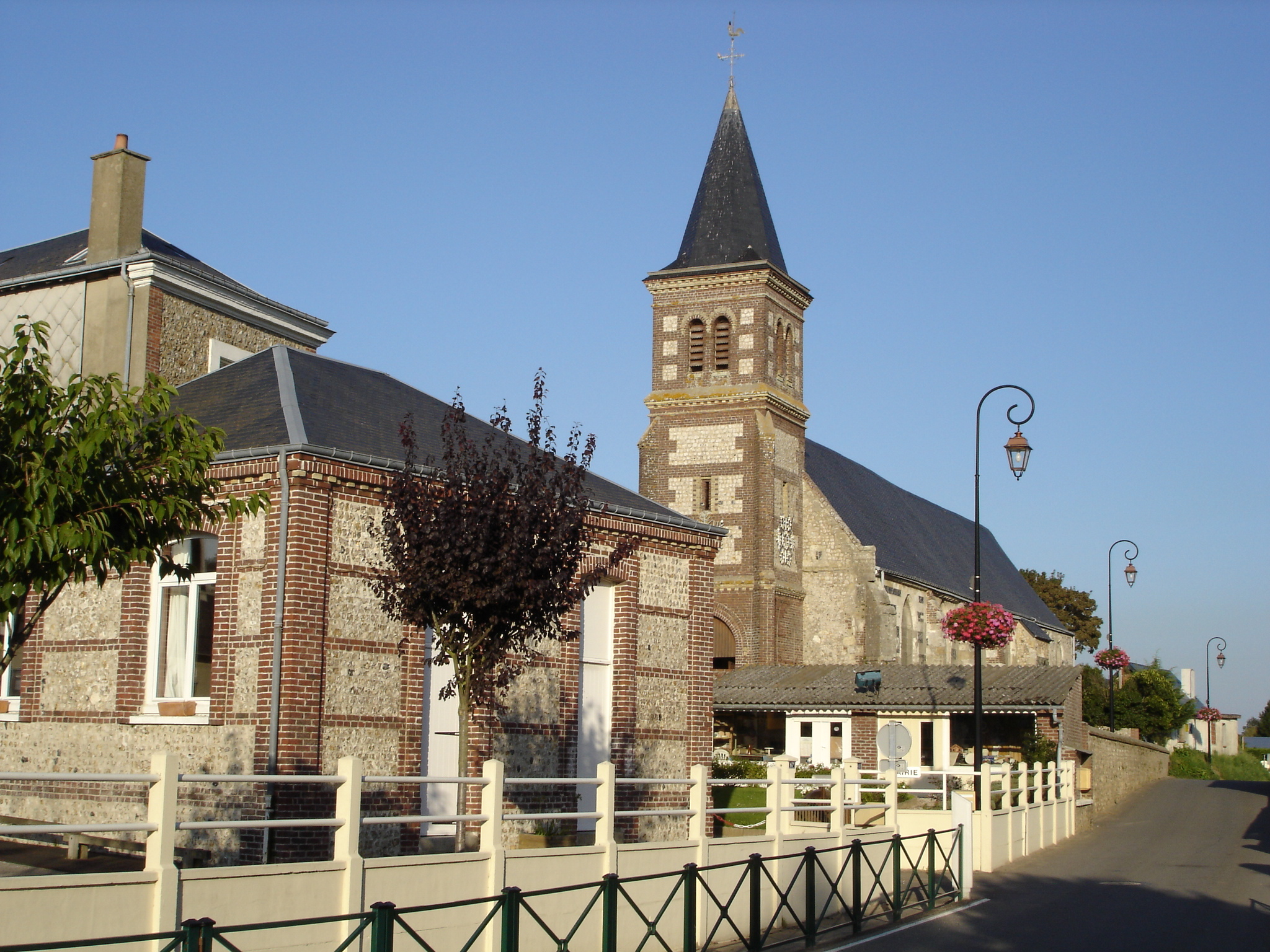 Au centre du village d'Heuqueville (Seine-Maritime)